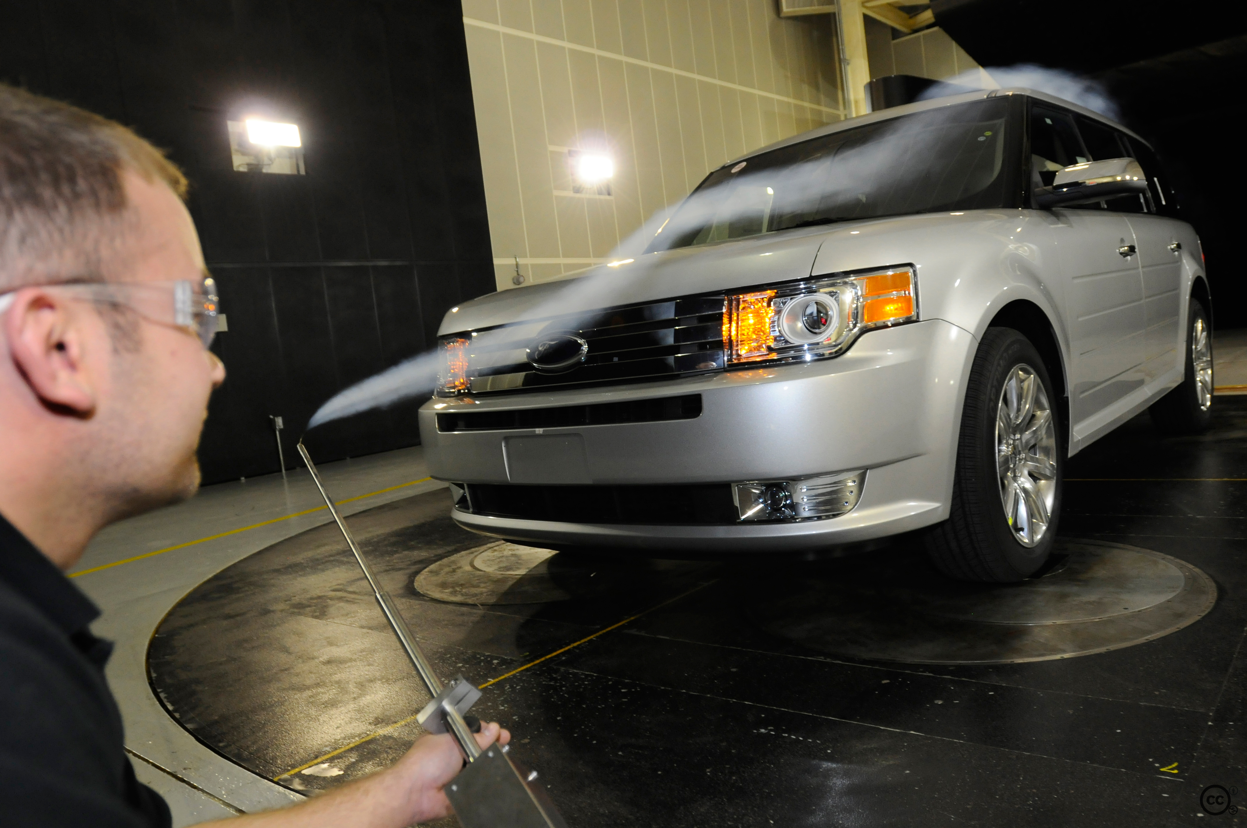 Test d'aérodynamisme sur une Ford Escape